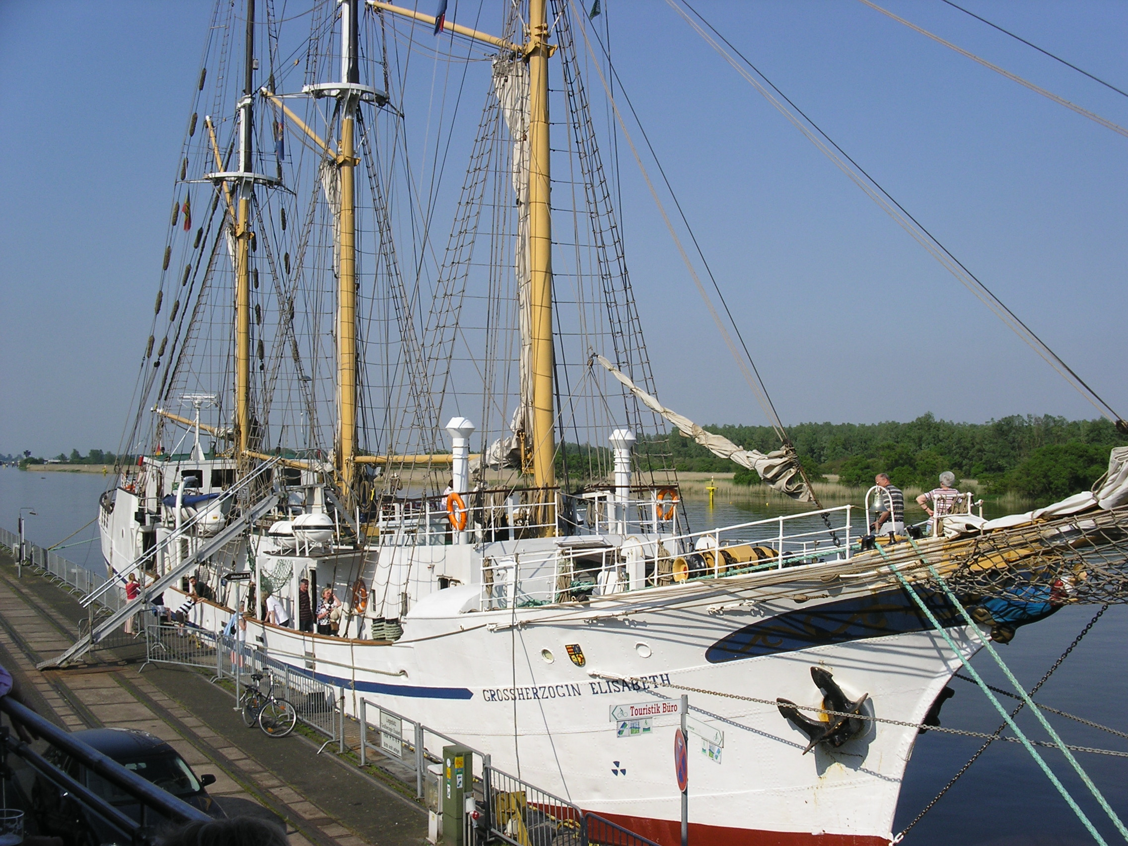 Die Großherzogin Elisabeth an ihrem Liegeplatz in Elsfleth